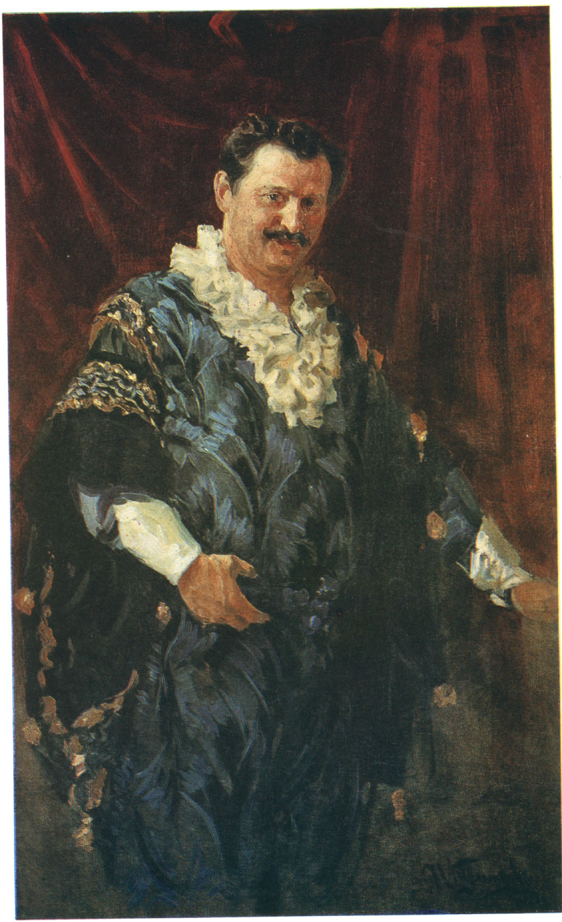 Куликов И.С. Портрет артиста А.Л.Дурова, 1911